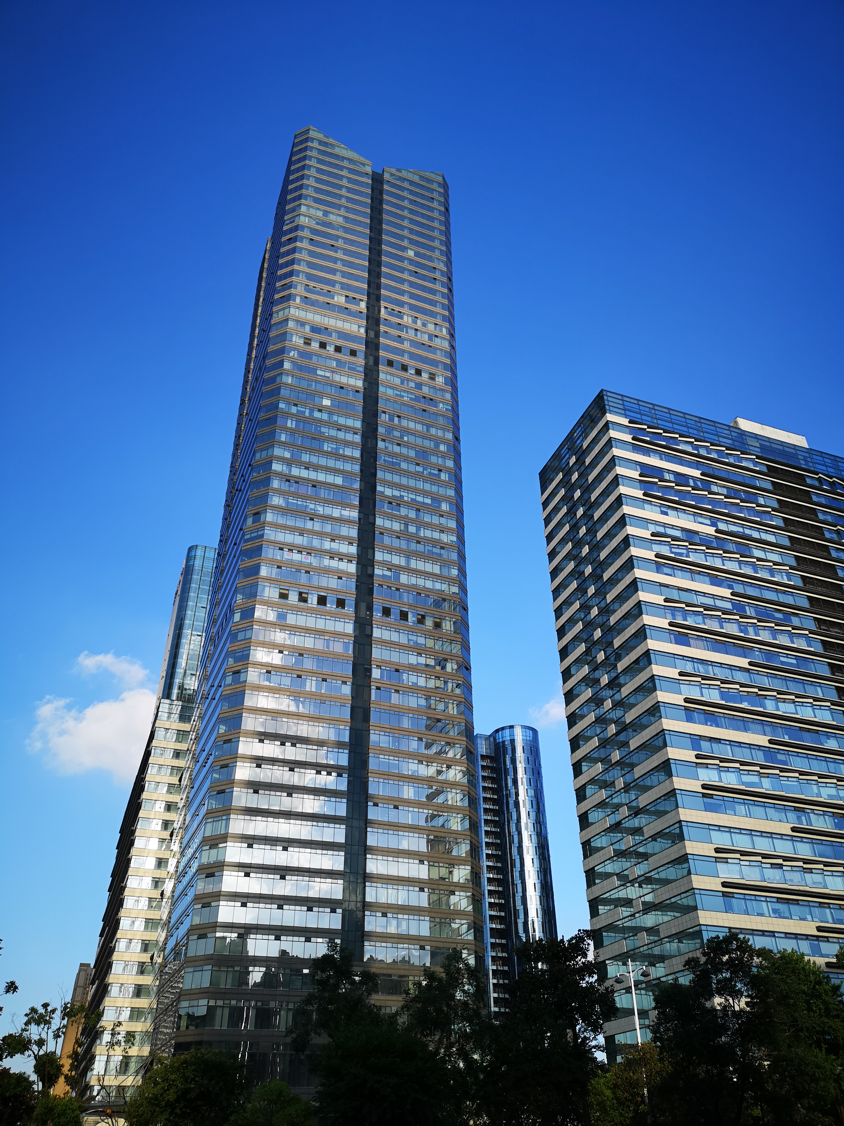 中文（中国大陆）: 置地栢悦中心C座